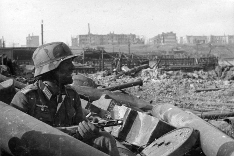 Russland, Kampf um Stalingrad, Soldat mit MPi Der Kampf in den Materiallagern Sowjetunion, Schlacht um Stalingrad.- Feldwebel Wilhelm Traub mit russischer Maschinenpistole PPSch 41 in Deckung zwischen Trümmern; Spätherbst 1942 Albensammlung von Aufnahmen der Propaganda-Kompanien, zusammengestellt vom Hauptreferat Bildpresse, Berlin